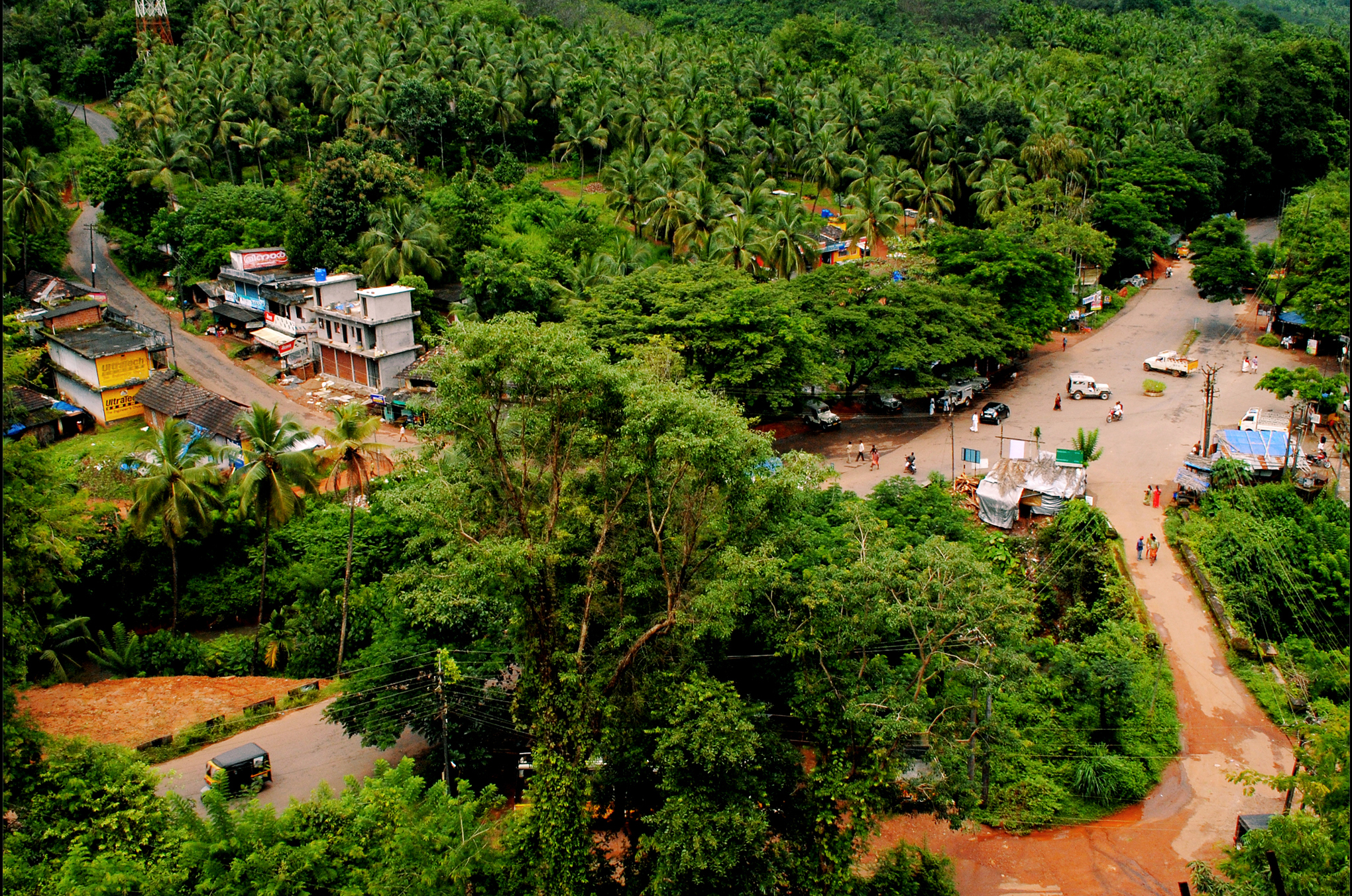 ODAYANCHA TOWN HIGH ANGLE VIEW